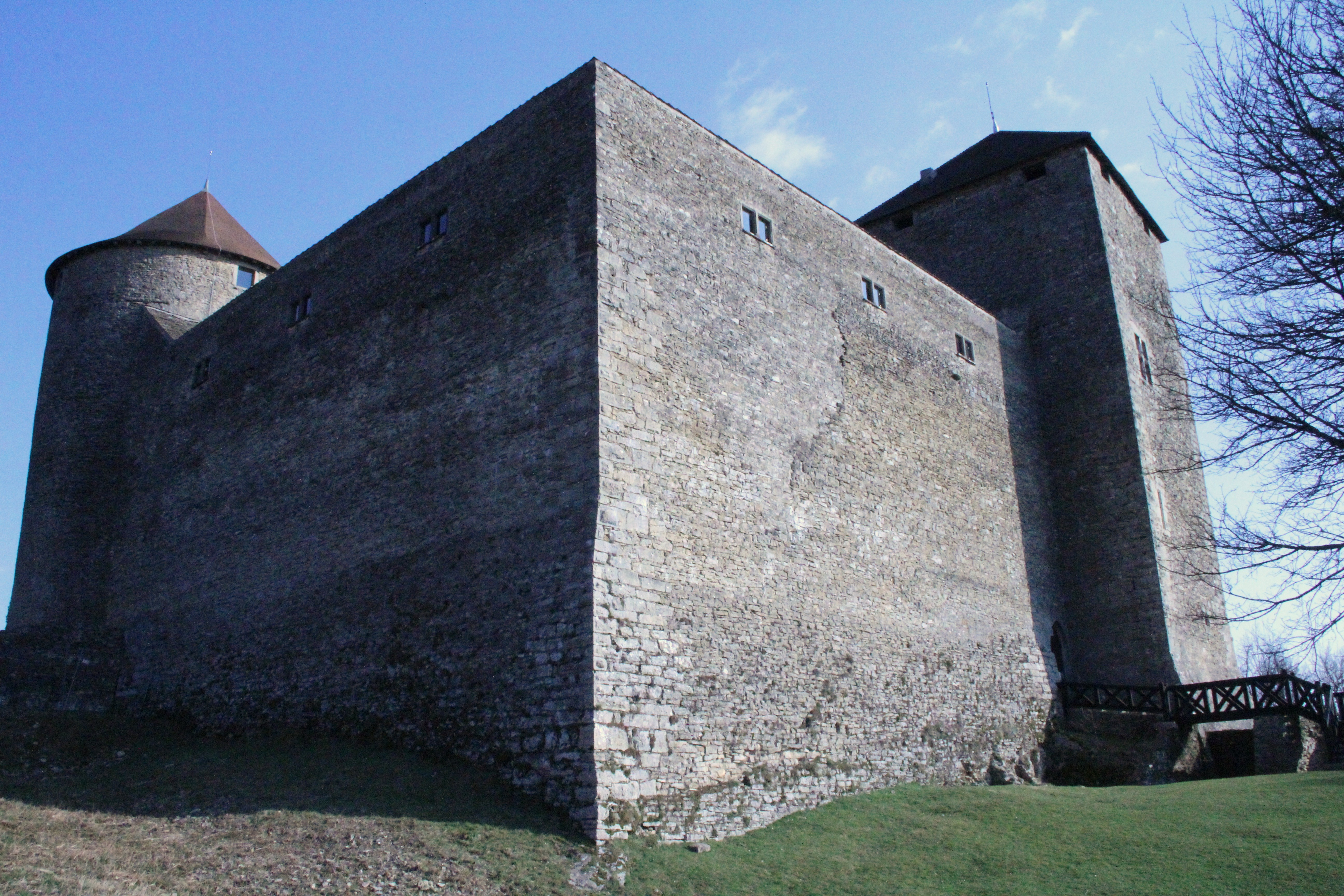 Au pied du château